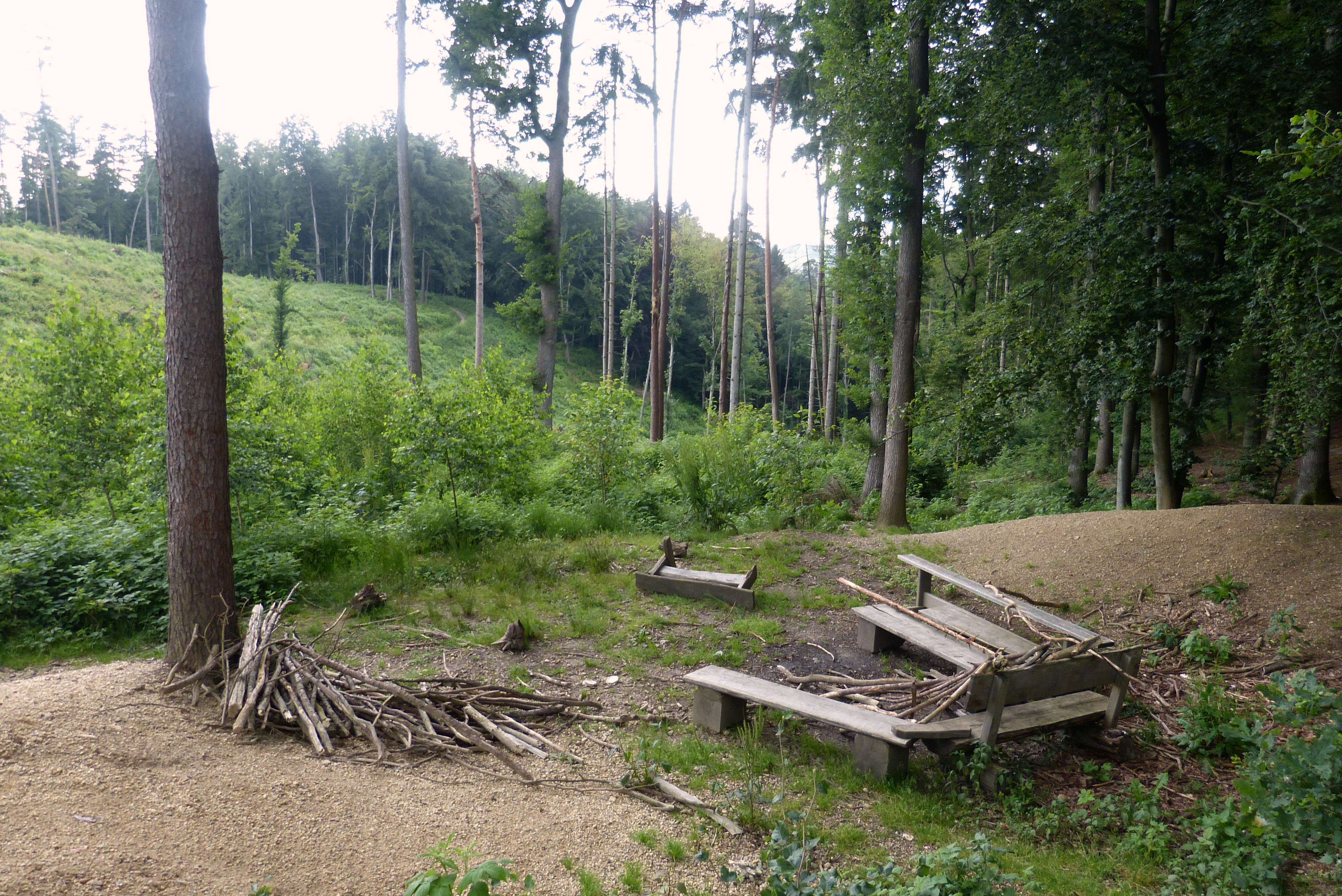 Ein mit Bänken ausgestatteter Platz mit schönem Ausblick im Landschaftsschutzgebiet Kobelwald.